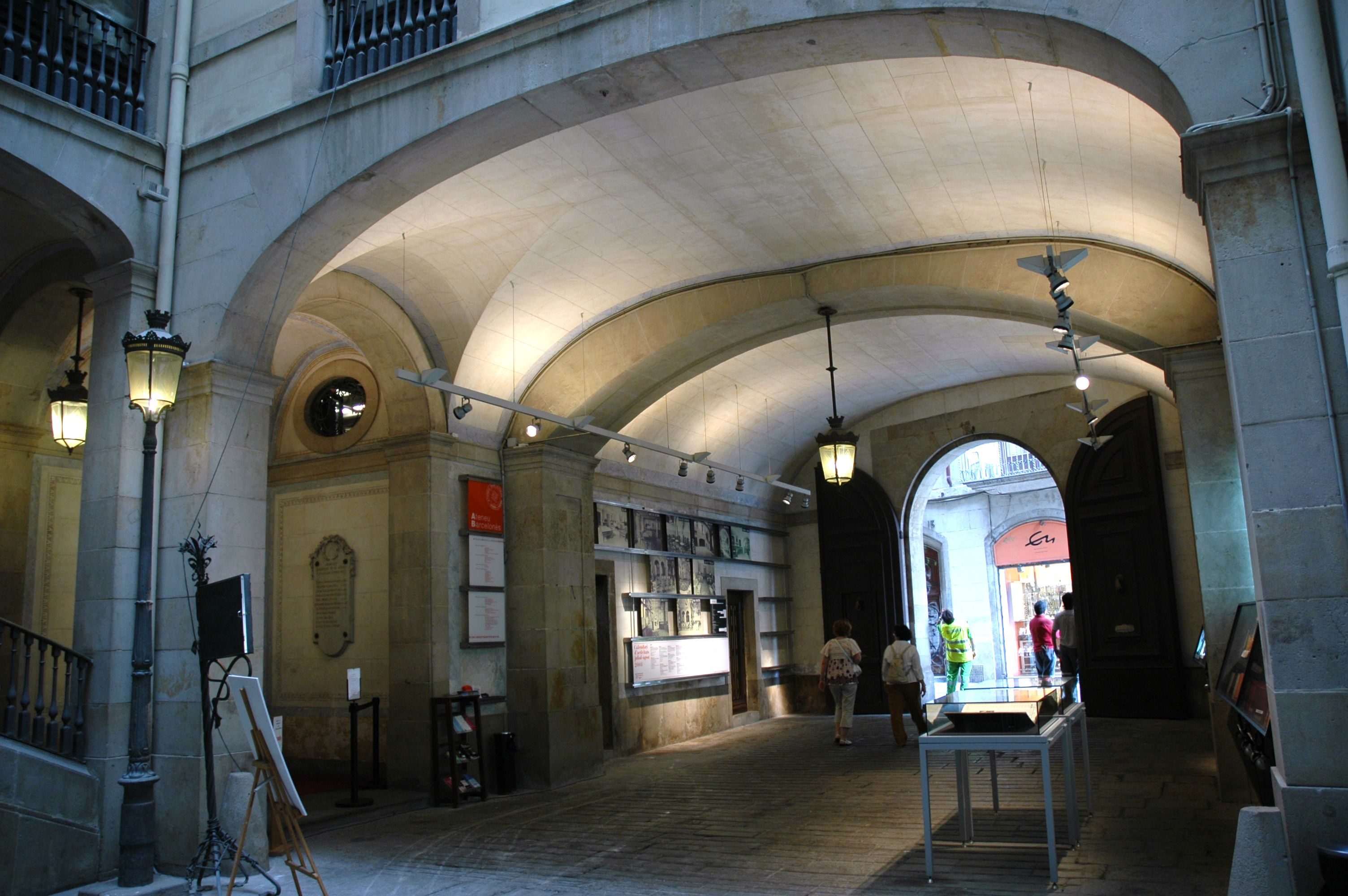 Ateneu barcelonès, al carrer de la Canuda i la plaça de la Vila de Madrid.